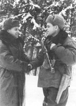 Дивизионный комиссар В.Я. Клоков поздравляет командира сводного парашютного отряда майора И.Г. Старчака (справа) с выполнением боевой задачи. Западный фронт, район наступления 43-й армии, январь 1942 г.